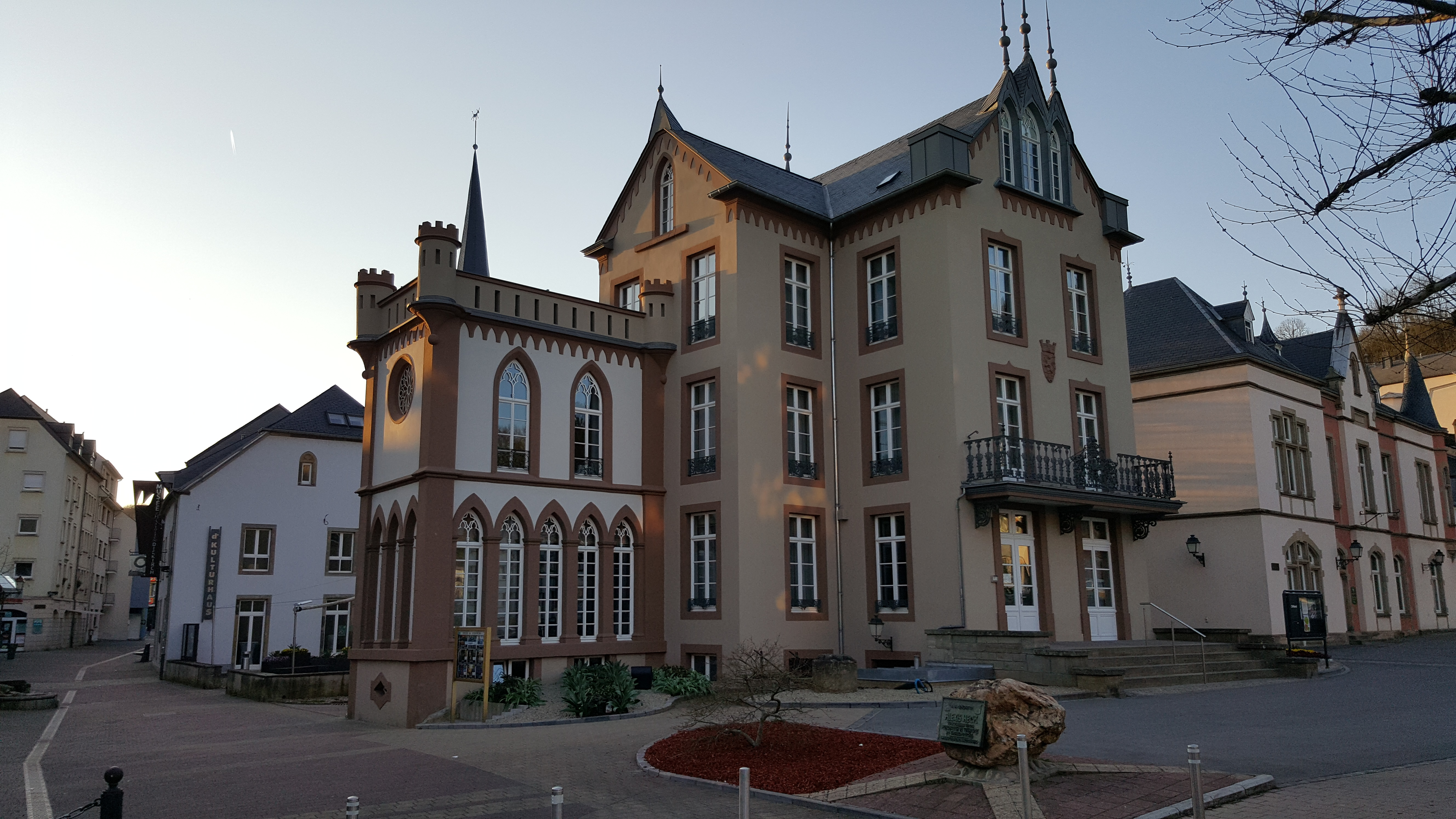 D'Wirtgensschlass am Abrëll 2017